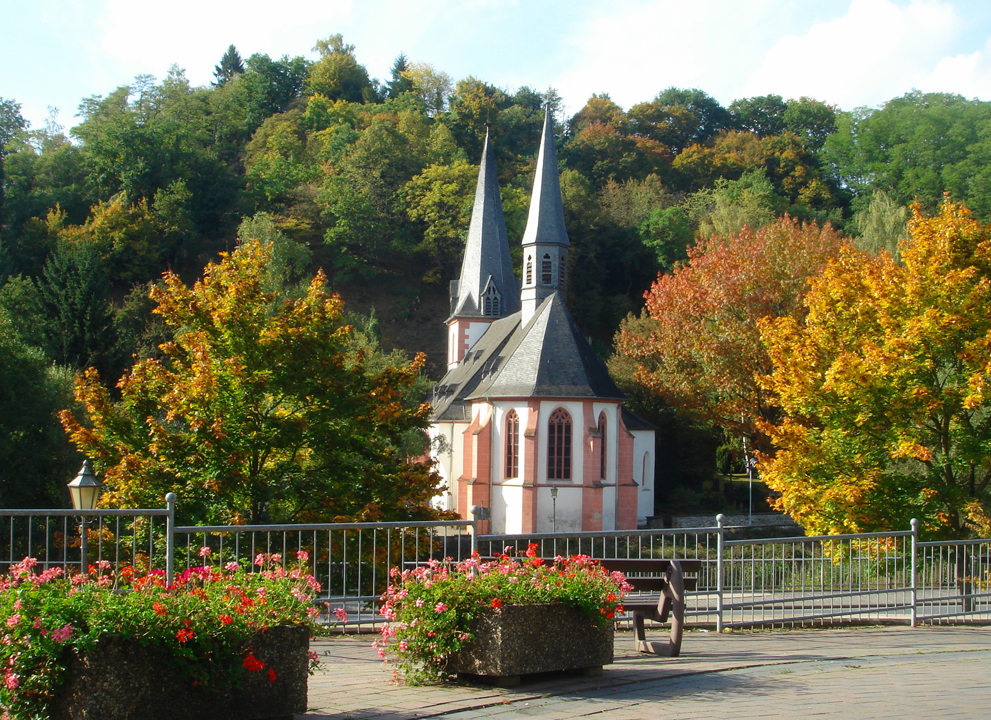 Spätgotische Liebfrauenkirche (14/15 Jh.) in Hadamar. Die dreischiffige Hallenkirche mit gotischem Deckenschmuck, Kreuzrippen- und Netzgewölben und barocker Ausstattung gilt als Kulturdenkmal nationalen Ranges.